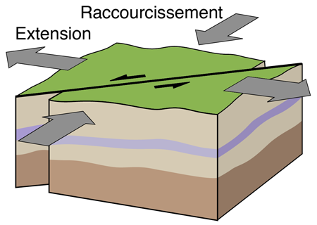 Schéma d'une Faille décrochante ou décrochement (Géologie, Tectonique)